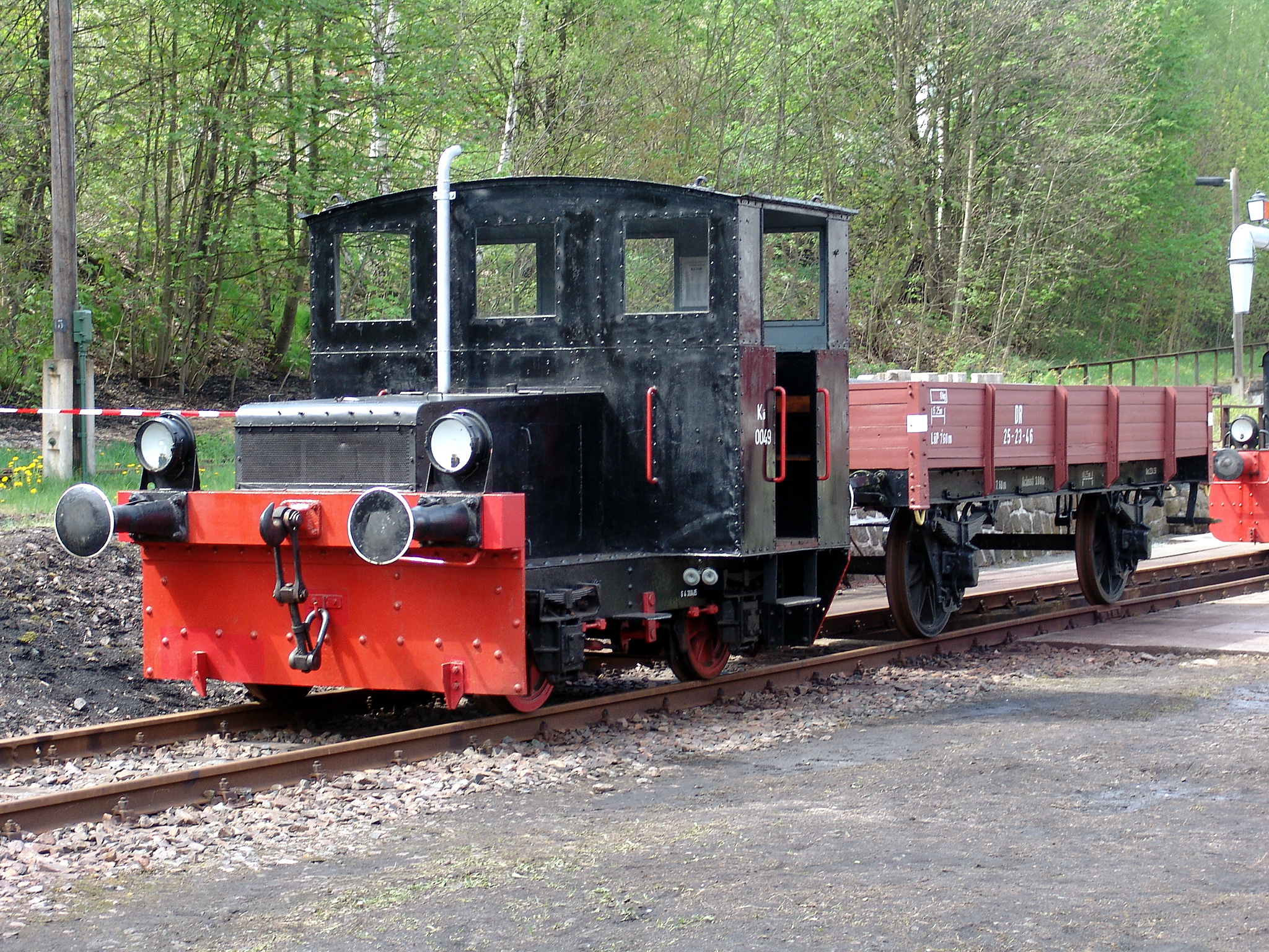 Kleinlokomotive Kö 0049 (Jung/FN 5396/1933) im Eisenbahnmuseum Scharzenberg Erzgebirge Foto: 07.05.2005 by Geme